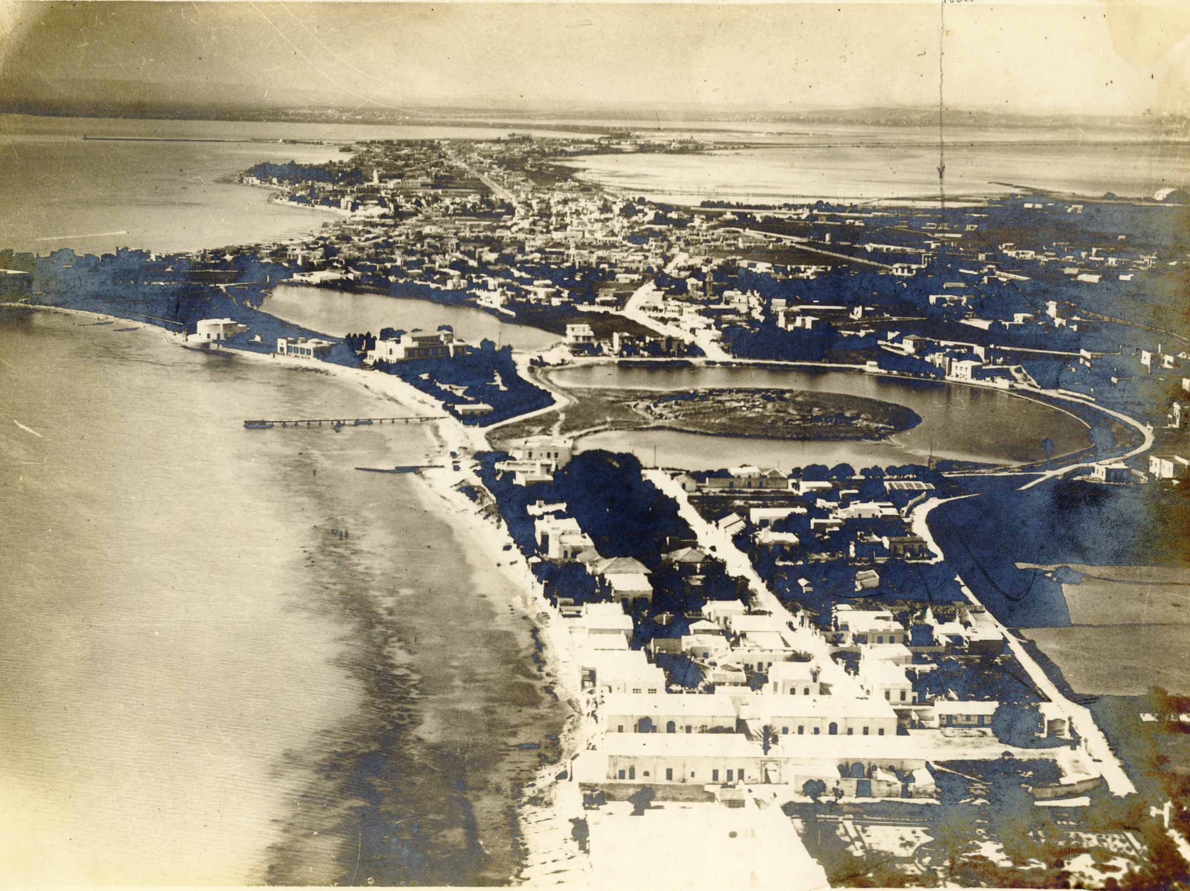 Carthage Ports Puniques 1922